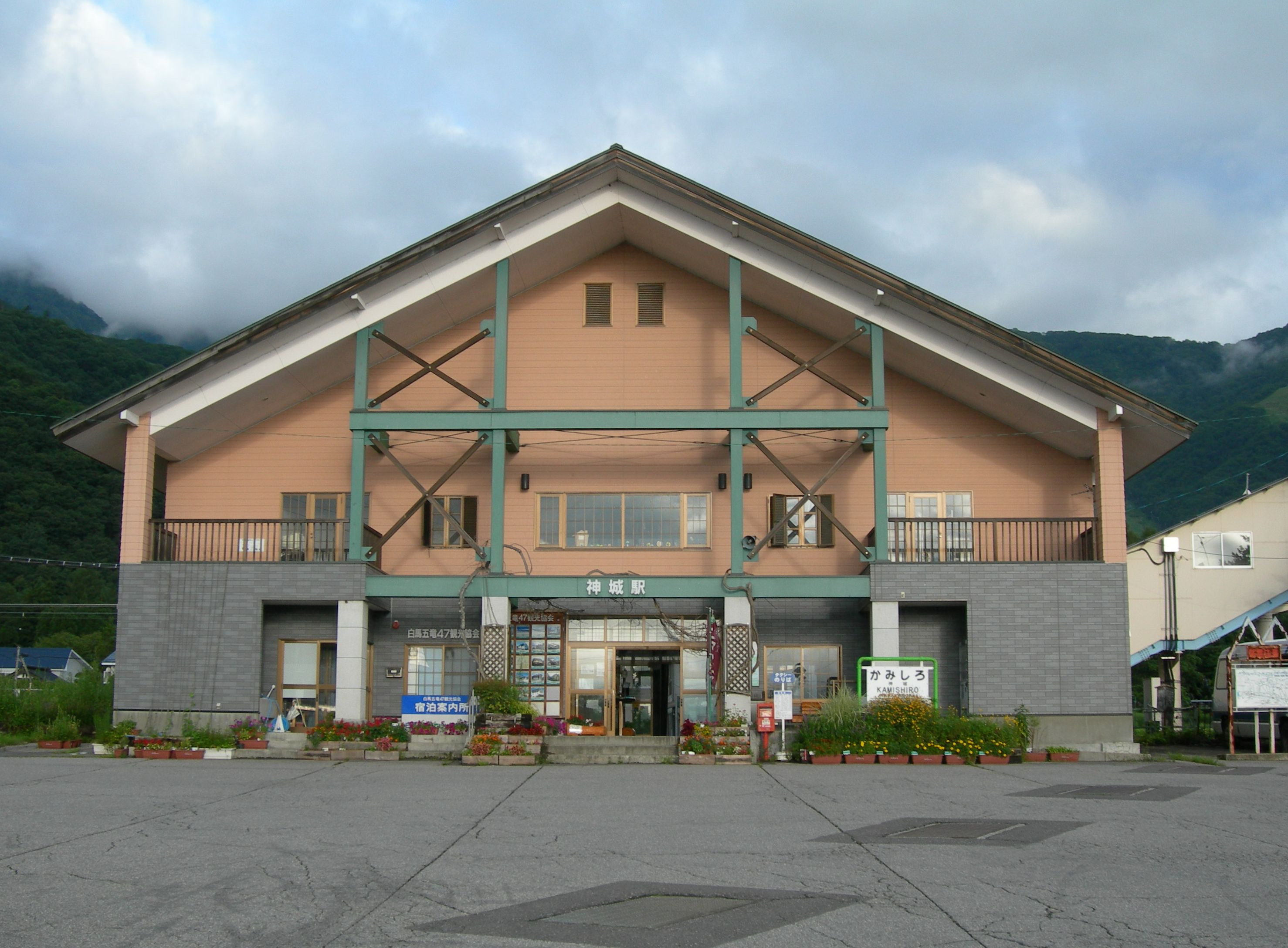 JR大糸線神城駅の駅舎外観